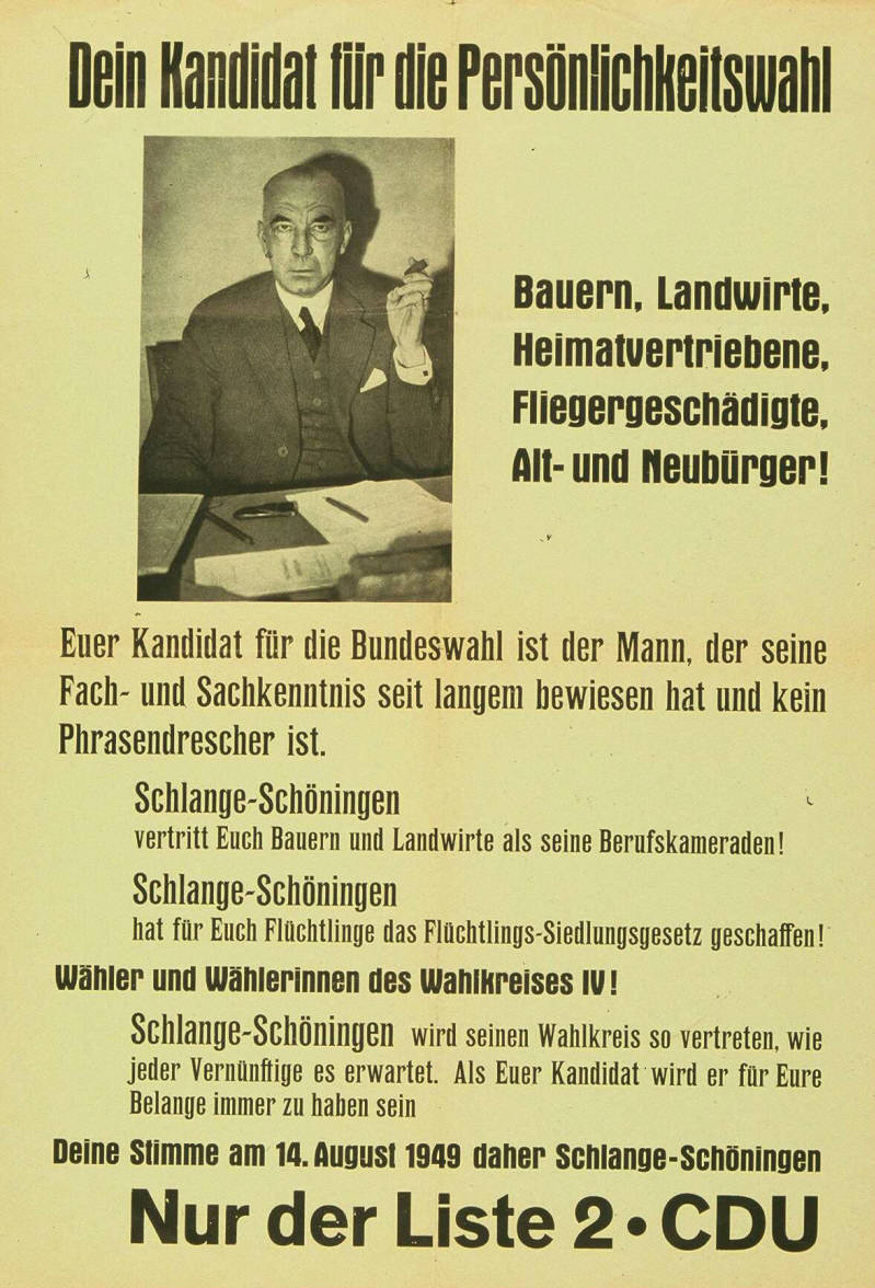 Dein Kandidat für die Persönlichkeitswahl Bauern Landwirte Heimatvertriebene Fliegergeschädigte Alt- und Neubürger! Euer Kandidat für die Bundeswahl ist der Mann, der seine Fach- und Sachkenntnis seit langem bewiesen hat und kein Phrasendrescher ist. Schlange-Schöningen vertritt Euch Bauern ... Abbildung: Porträtfoto Plakatart: Kandidaten-/Personenplakat mit Porträt Objekt-Signatur: 10-001: 227 Bestand: Plakate zu Bundestagswahlen (10-001) GliederungBestand10-18: Plakate zu Bundestagswahlen (10-001) » Die 1. Bundestagswahl am 14. August 1949 » CDU » Mit Porträtfoto Lizenz: KAS/ACDP 10-001: 227 CC-BY-SA 3.0 DE